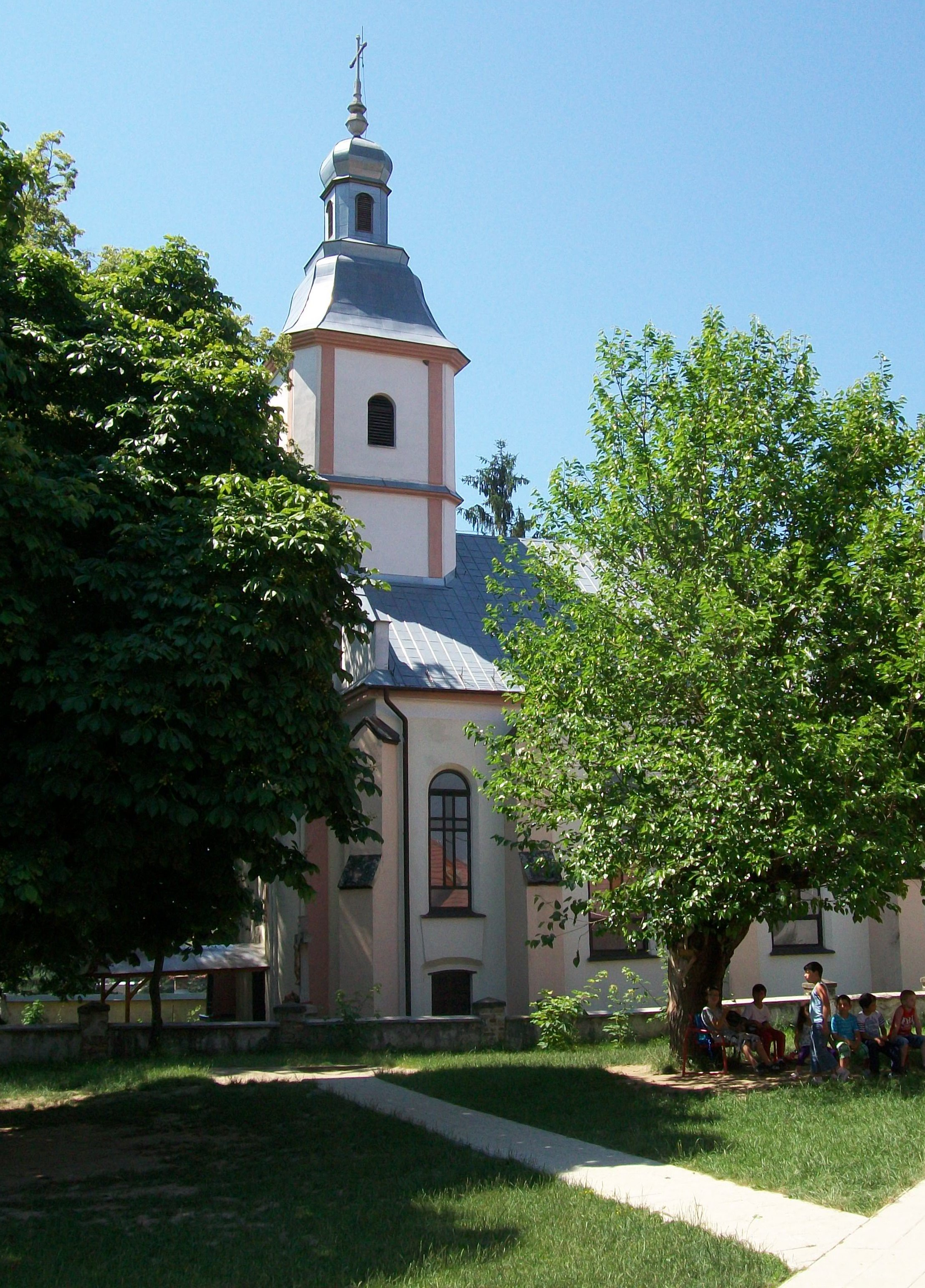 Rímskokatolícky kostol sv. Alžbety Uhorskej v Trebeľovciach